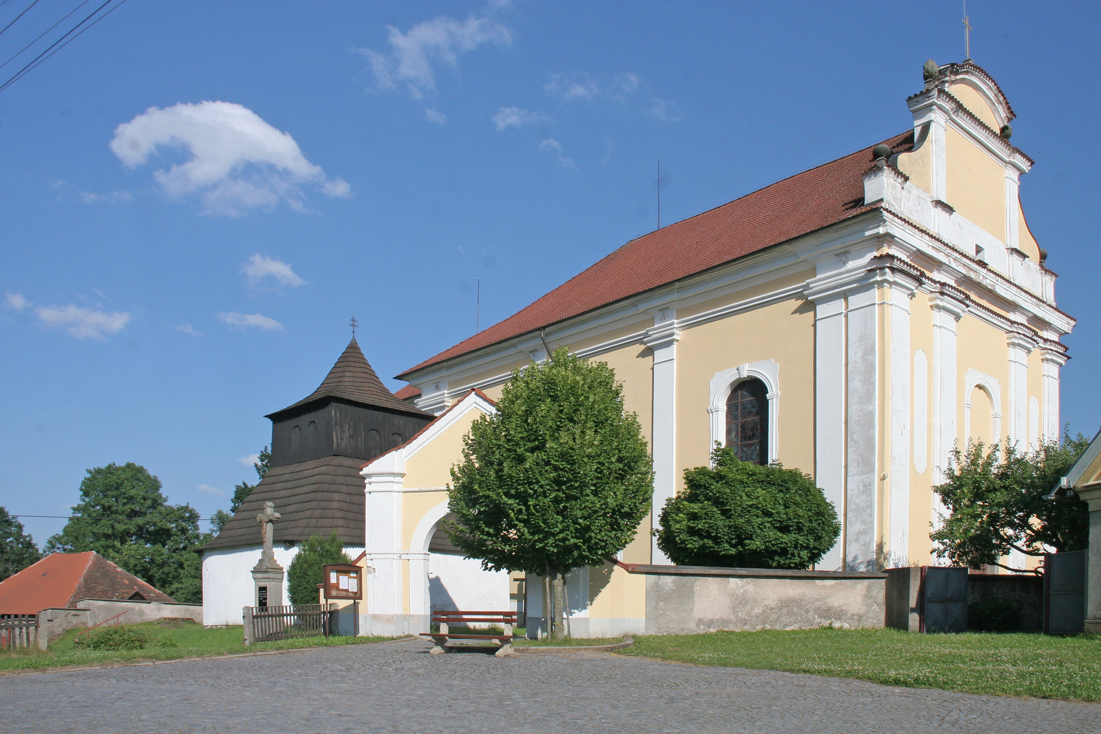 Kostel sv. Víta (Bojanov), nám., Bojanov, Bojanov.